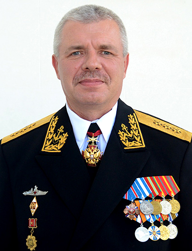 Командующий Черноморским флотом ВМФ России адмирал Александр Викторович Витко